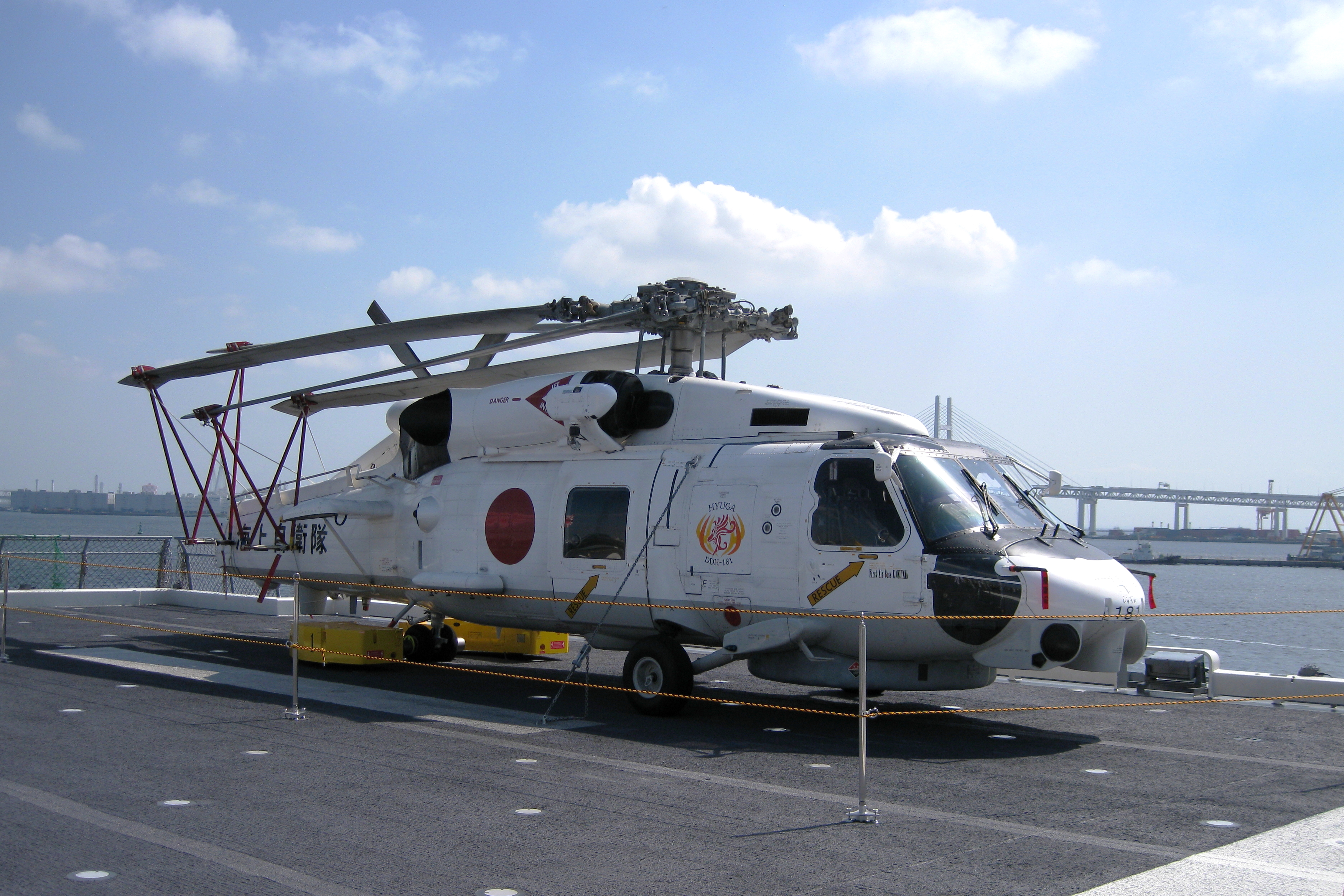 海上自衛隊の護衛艦ひゅうが。 用途廃止になったSH-60Jが搭載されている